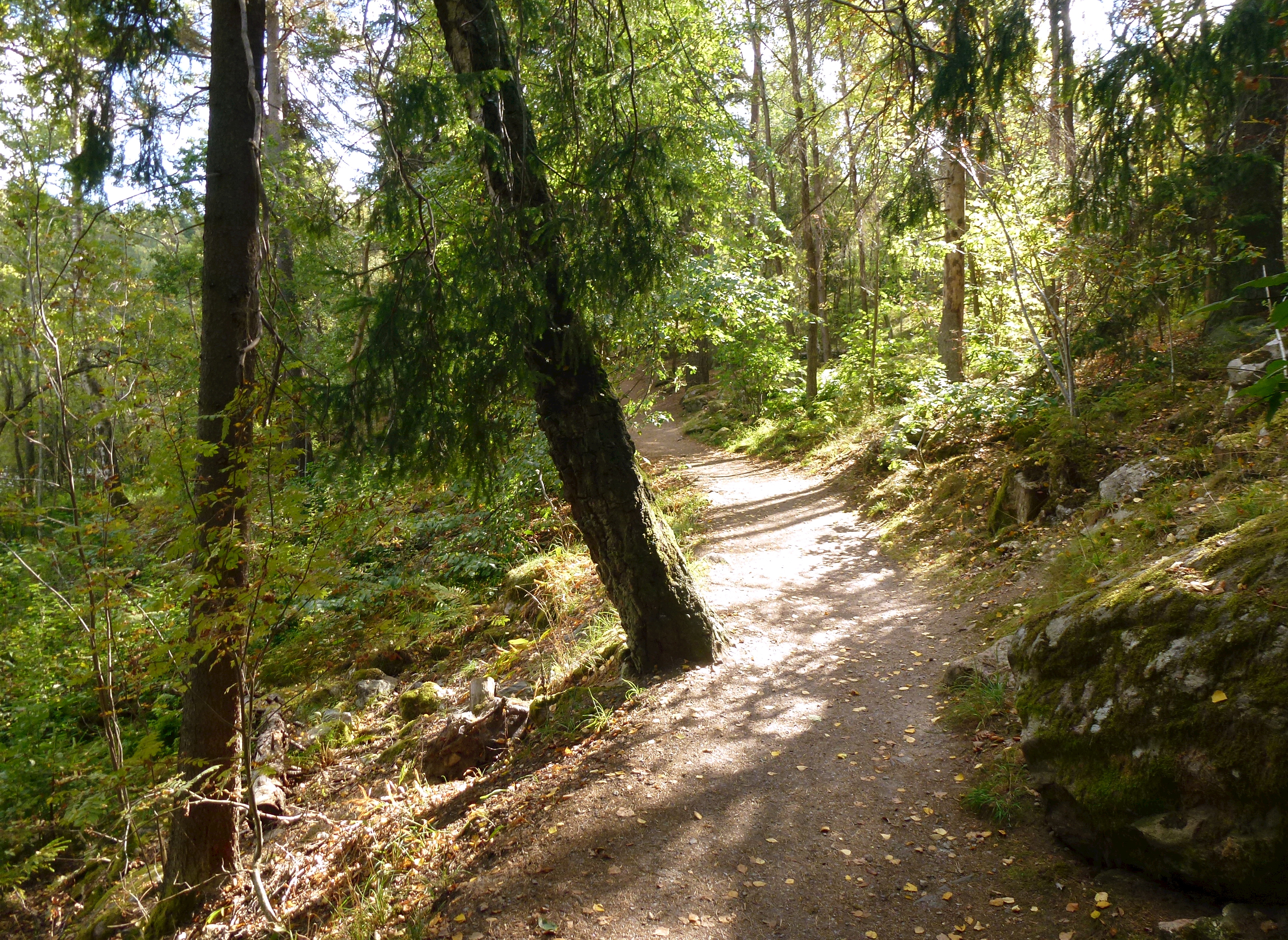 Promenadstig i Judarskogens naturreservat